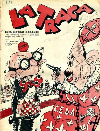 Portada de la Traca de l'època republicana (abans de la Guerra)